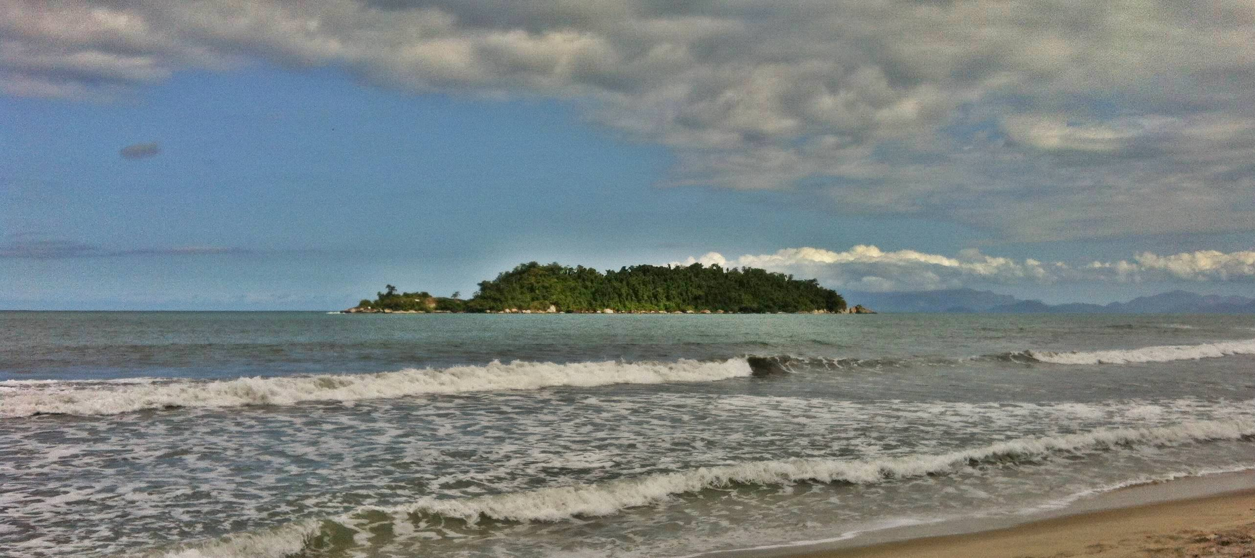 Mambucaba